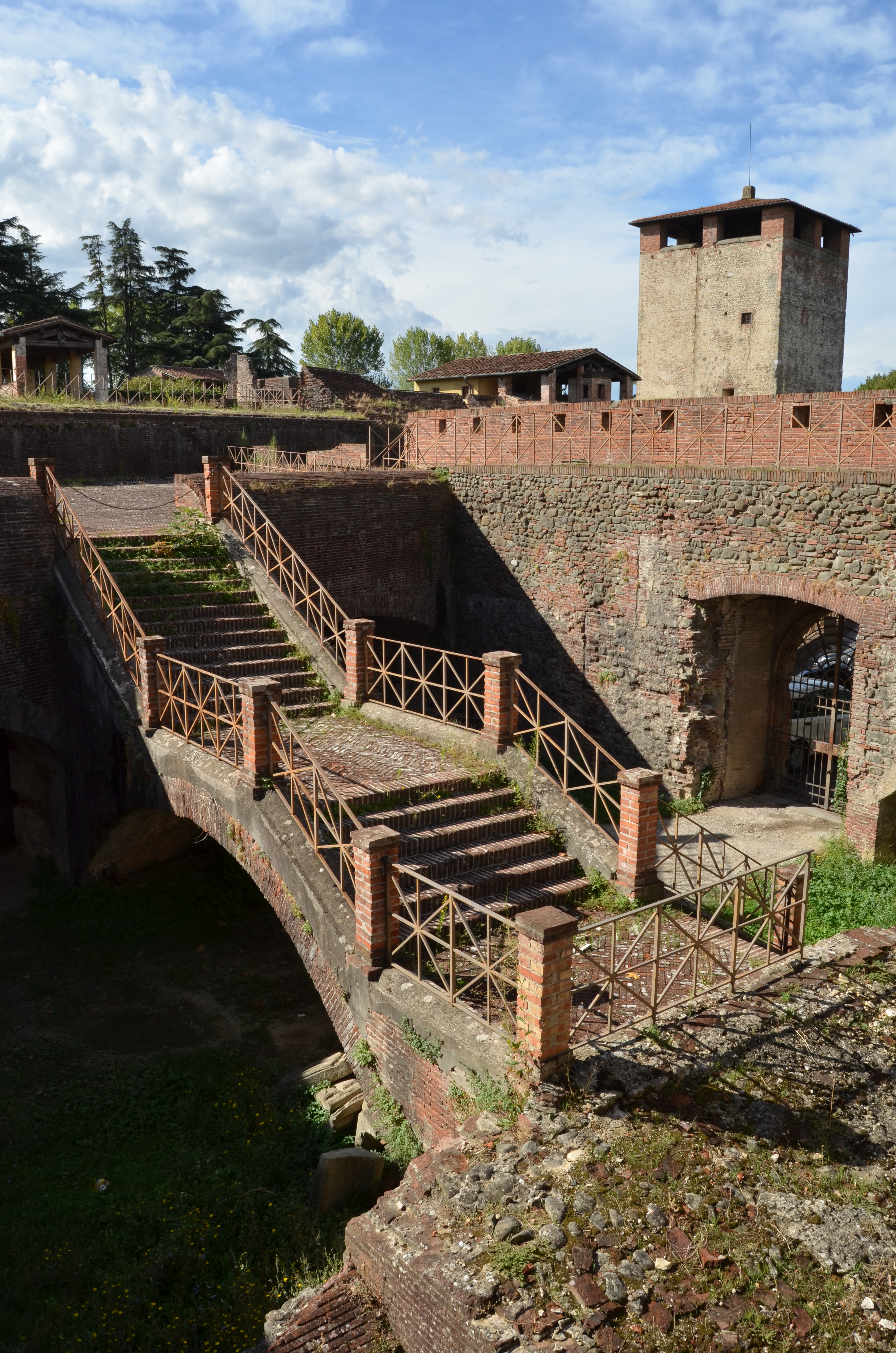 Fortezza di Santa Barbara - MIBAC This is a photo of a monument which is part of cultural heritage of Italy.